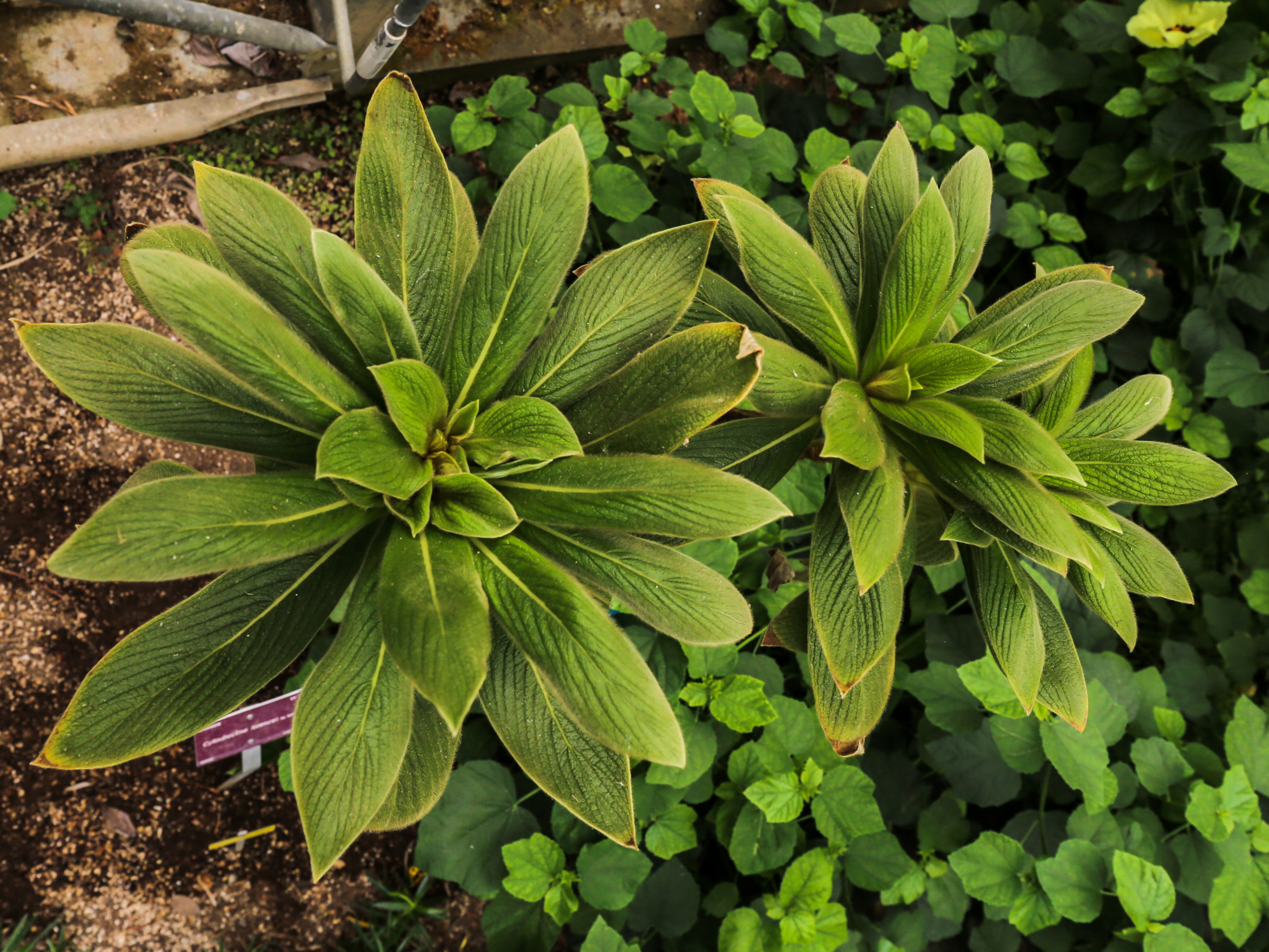 Cylindrocline lorencei Conservatoire botanique national de Brest Native nameConservatoire botanique national de BrestLocationBrest, FranceCoordinates48° 24′ 10.35″ N, 4° 26′ 53.58″ W Established1975: established, 1978: opened to publicWeb page control : Q2994486 VIAF: 135879850 ISNI: 0000 0000 9261 8684 LCCN: no95047958 WorldCat institution QS:P195,Q2994486